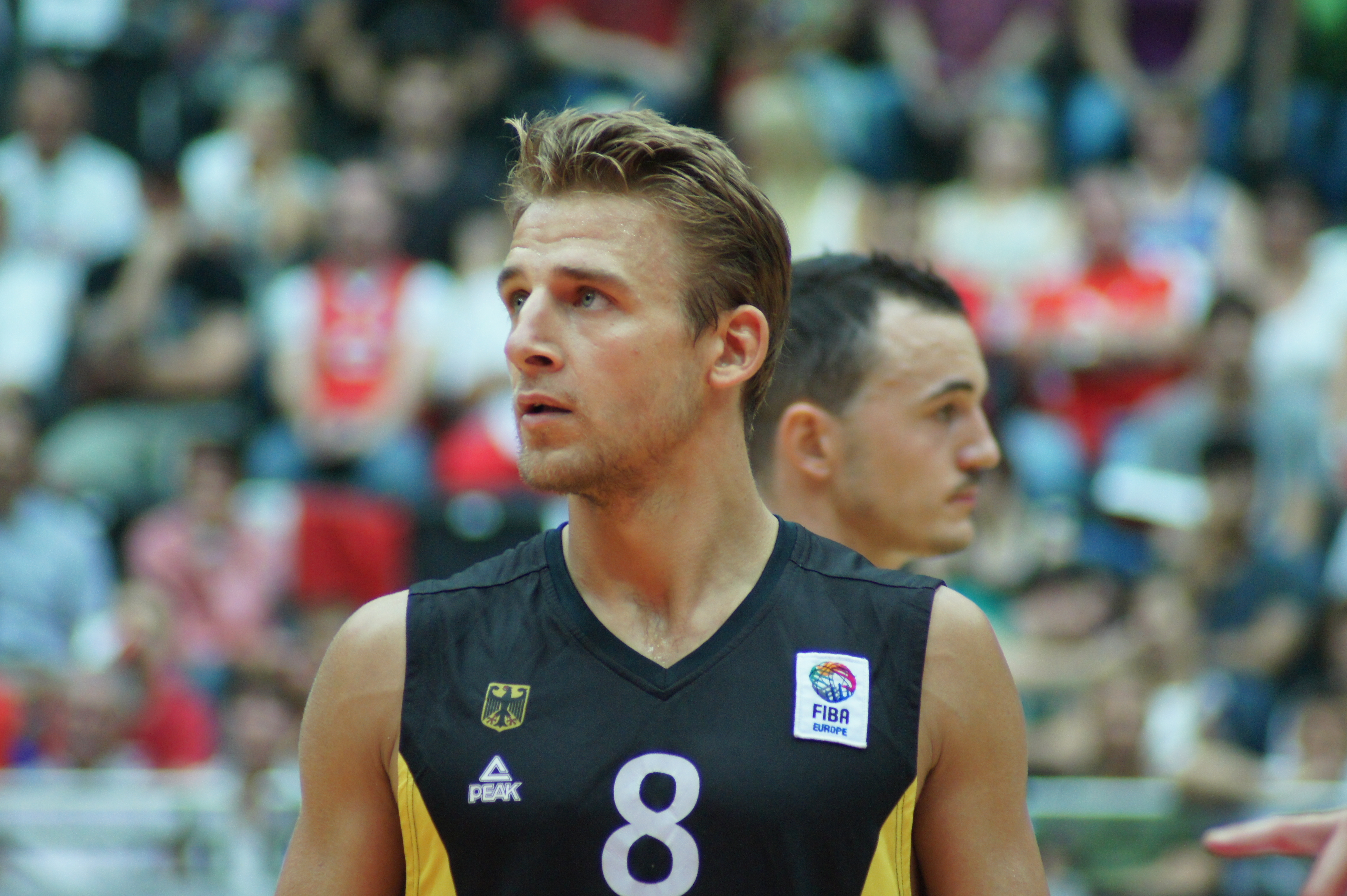 Qualifikationsspiel EuroBasket Österreich - Deutschland, 13. August 2014 im Multiversum Schwechat.